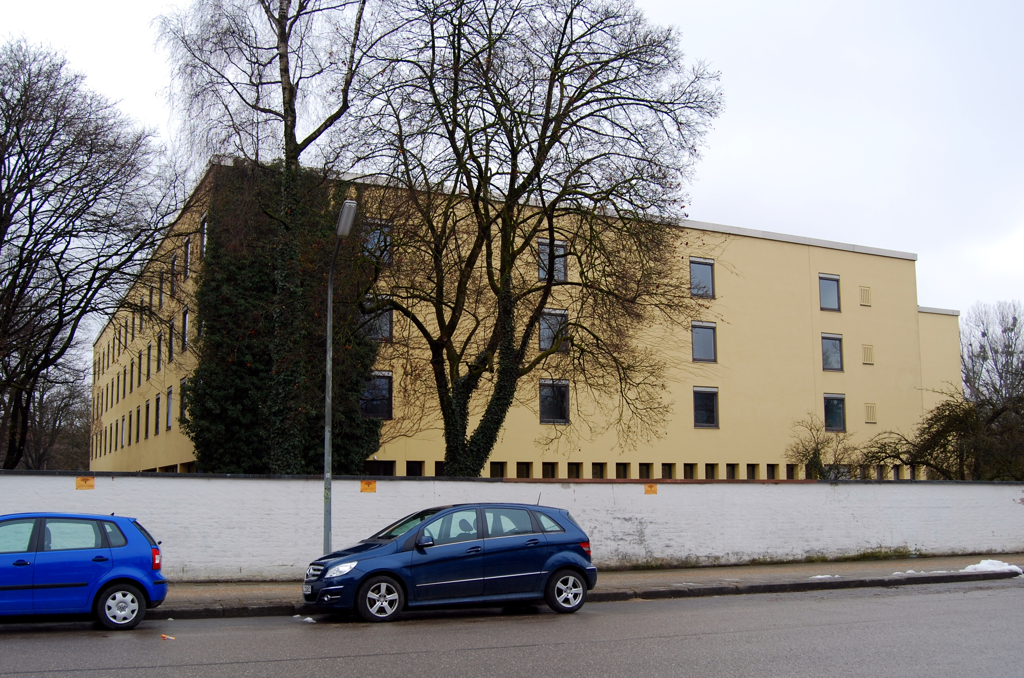 Nördlicher Erweiterungsbau des Max-Josef-Stift in München-Bogenhausen